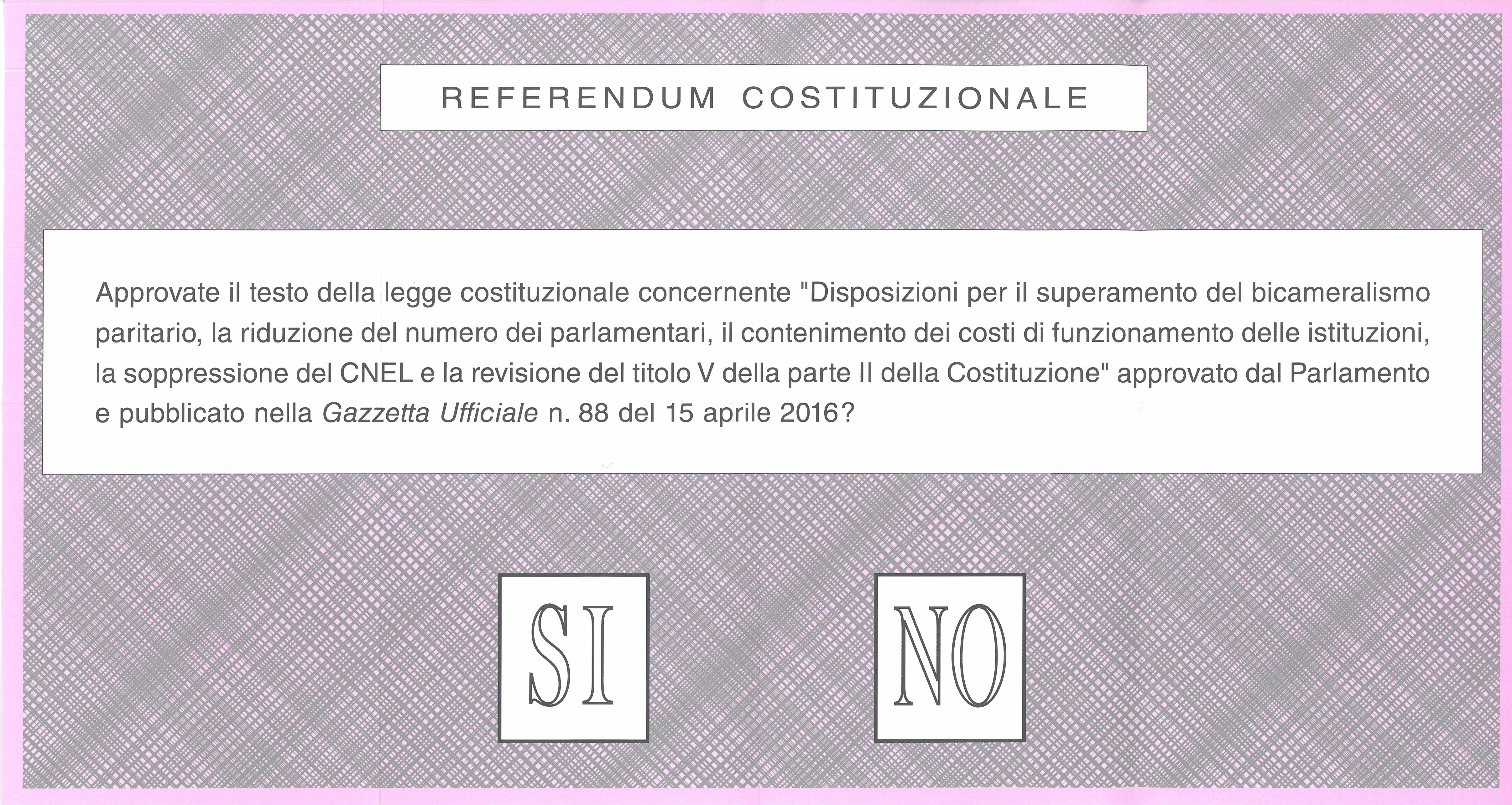 Referendum del 4 dicembre 2016 - Scheda referendaria.